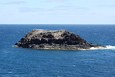 Sitio de interés científico de Gran Canaria